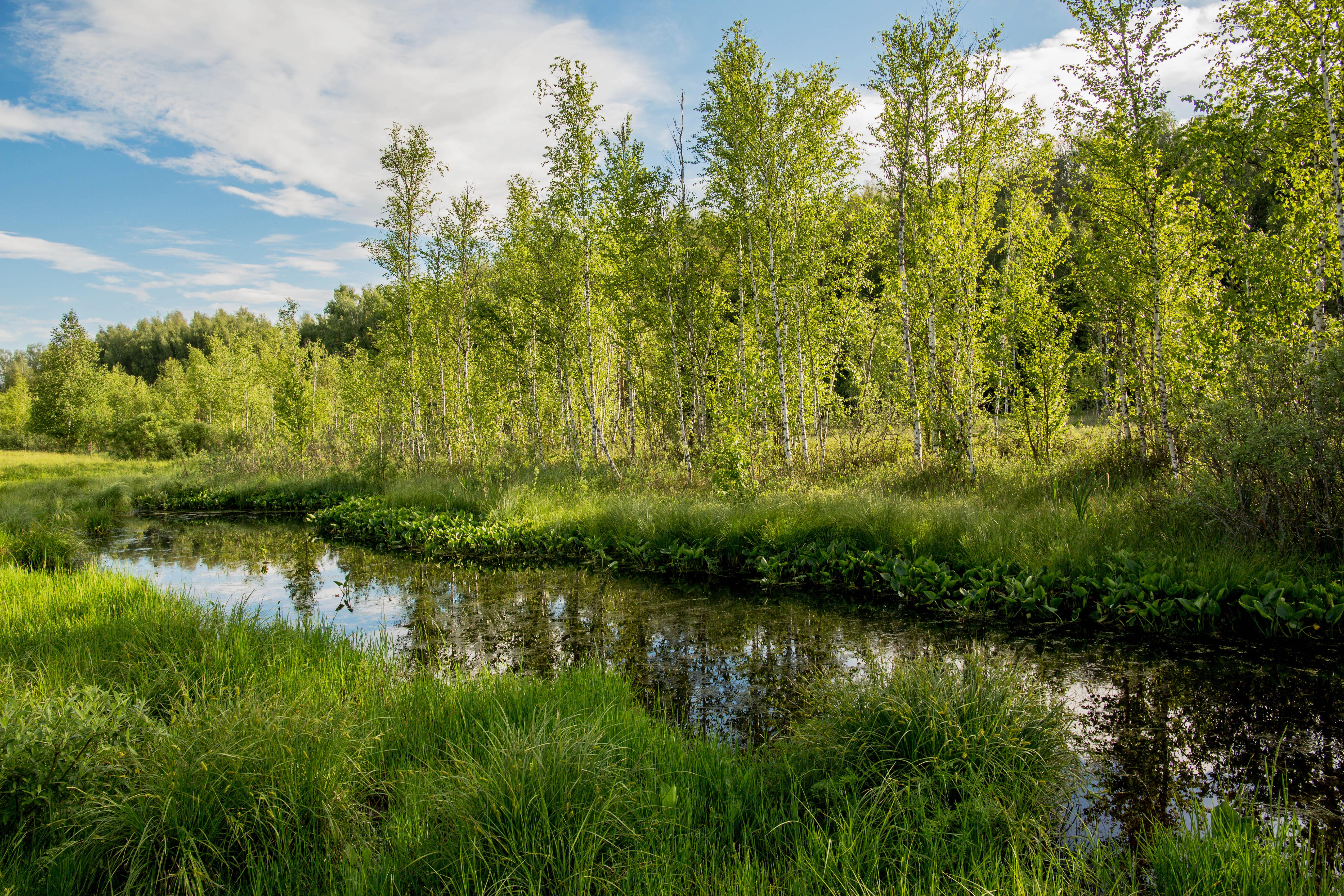 Ильинская балка: Зеленодольский лесхоз, в 1,5 км юго-восточнее с. Ильинское, Ильинское, Зеленодольский район, Татарстан This image is related to the protected area of Russia number 1610084